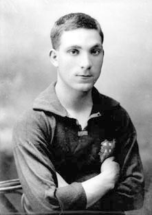 Gabriel Bau